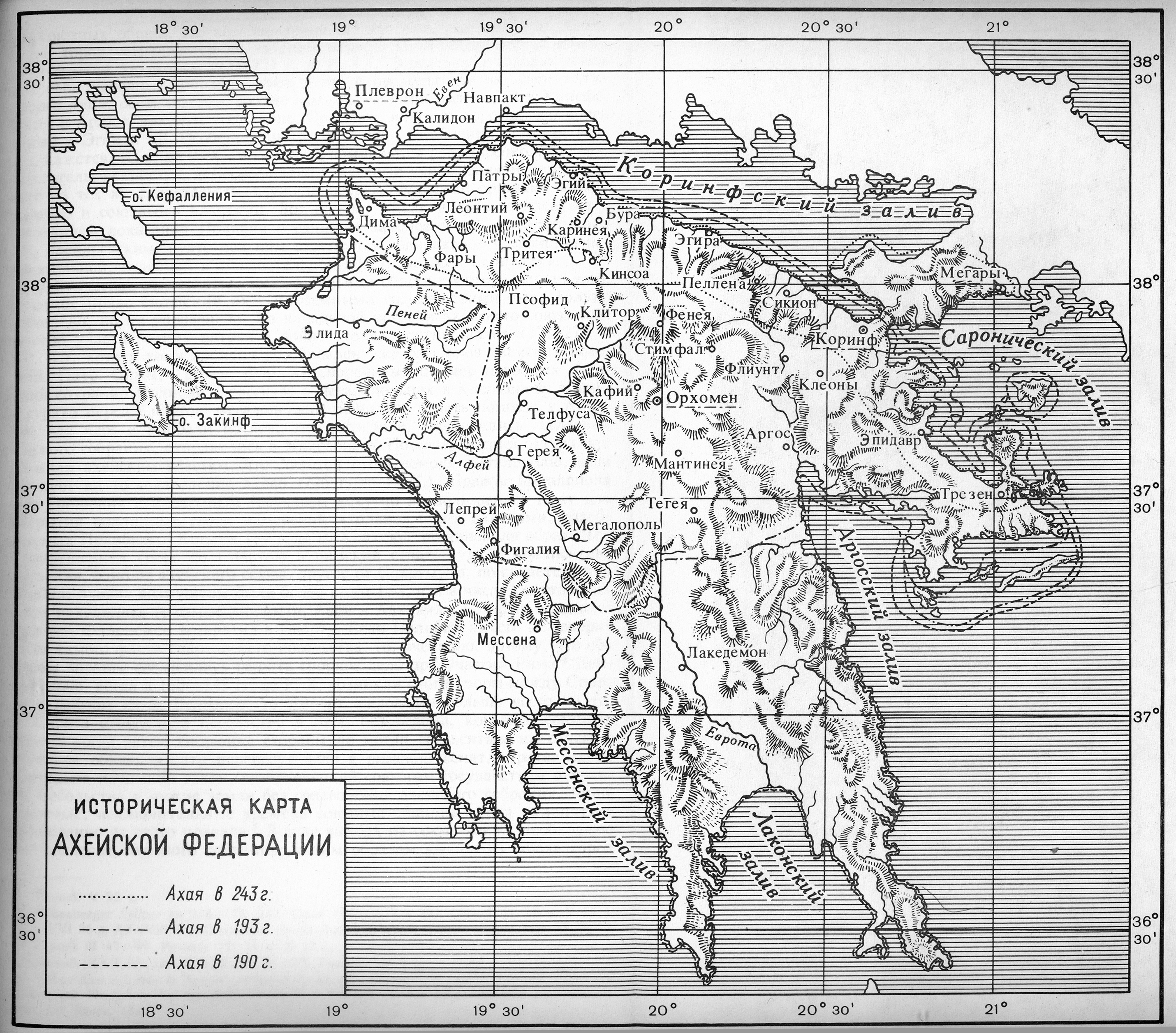 Политическая карта Ахейского Союза